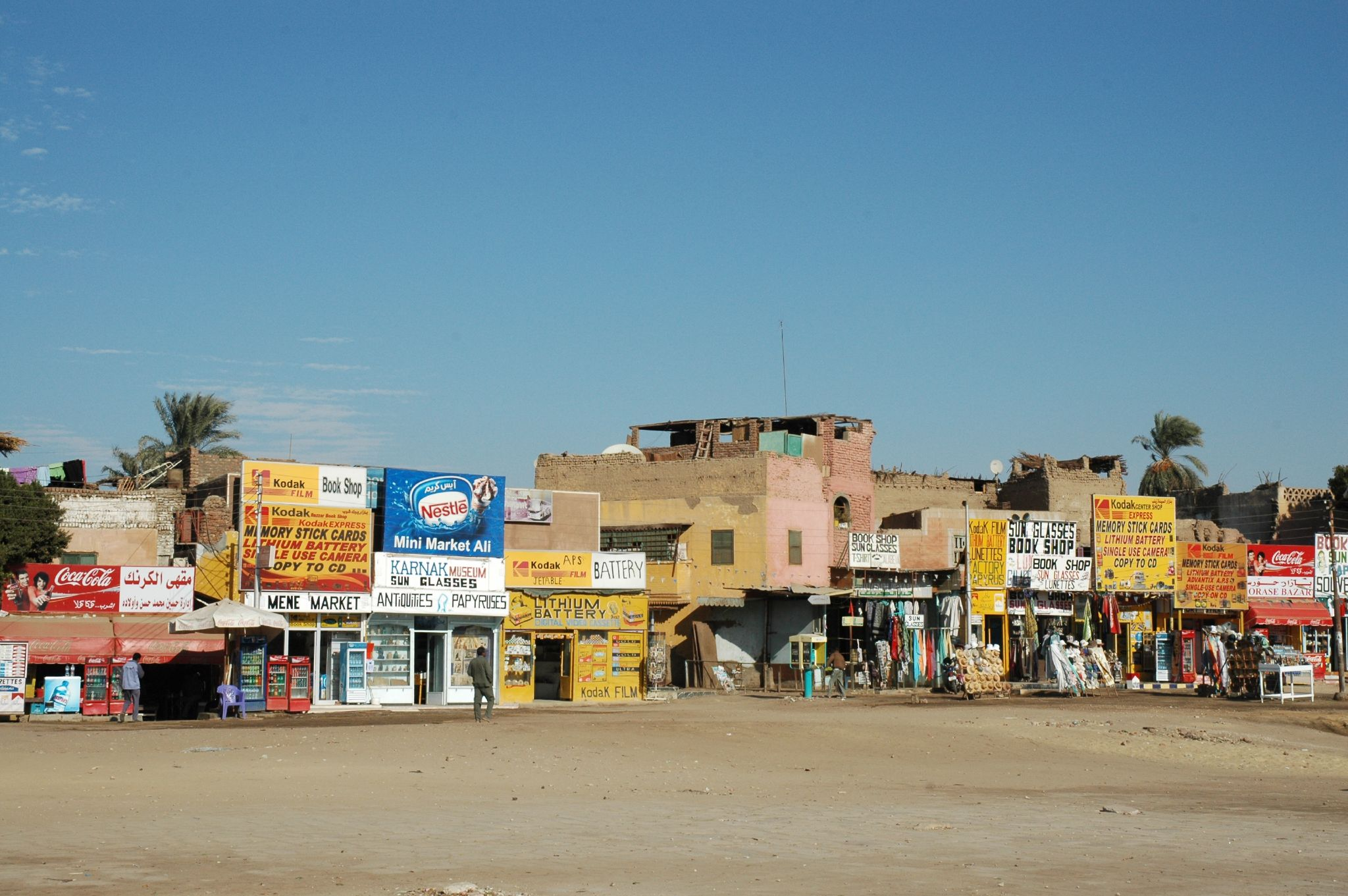 Tempio di Karnak: negozi davanti all'ingresso